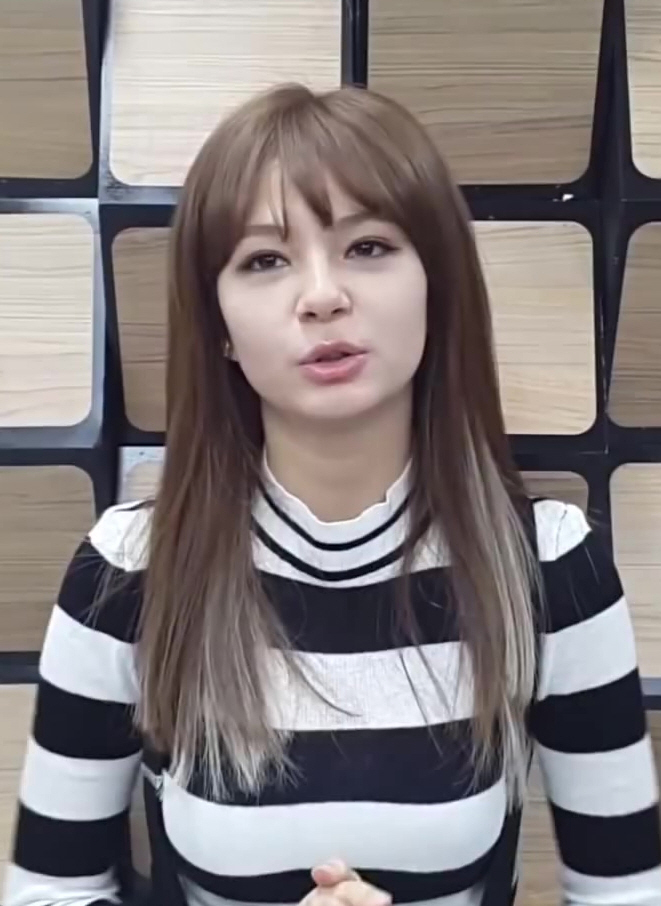 (싹튜브) SAC 방송댄스과 졸업발표회 축하메세지